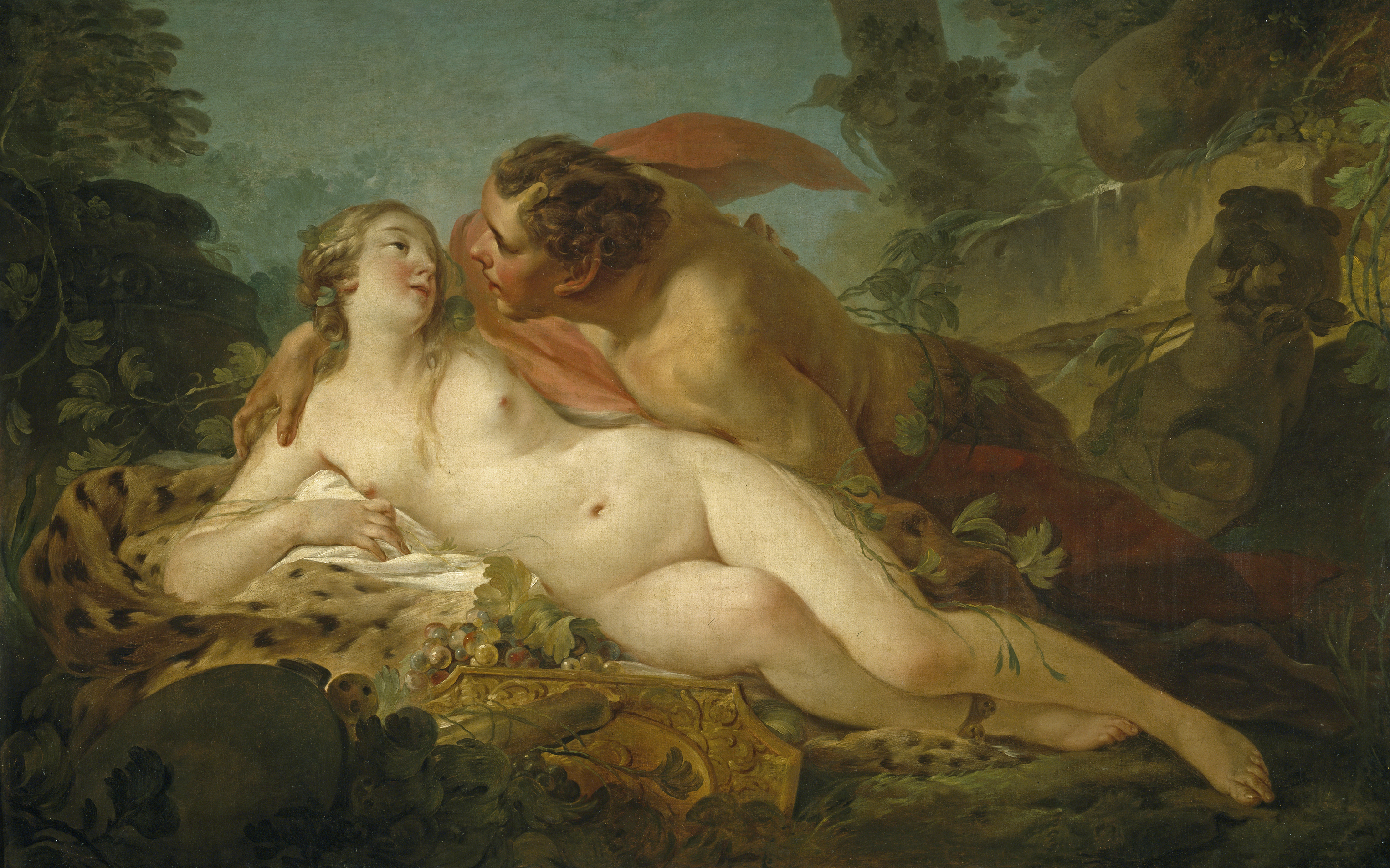 Escena narrada por Ovidio (Metamorfosis, libro VI) que muestra el engaño del dios Júpiter a la ninfa Antíope. Ninfa de gran belleza es seducida por el señor del Olimpo metamorfoseado en un sátiro. Pierre representa el momento del engaño inicial, cuando Antíope se abandona en los brazos de Júpiter. Destacan la plasticidad de las figuras y las gamas de colores pasteles que elevan el carácter sensual de la composición. Esta obra es compañera de Diana y Calisto (P03217).